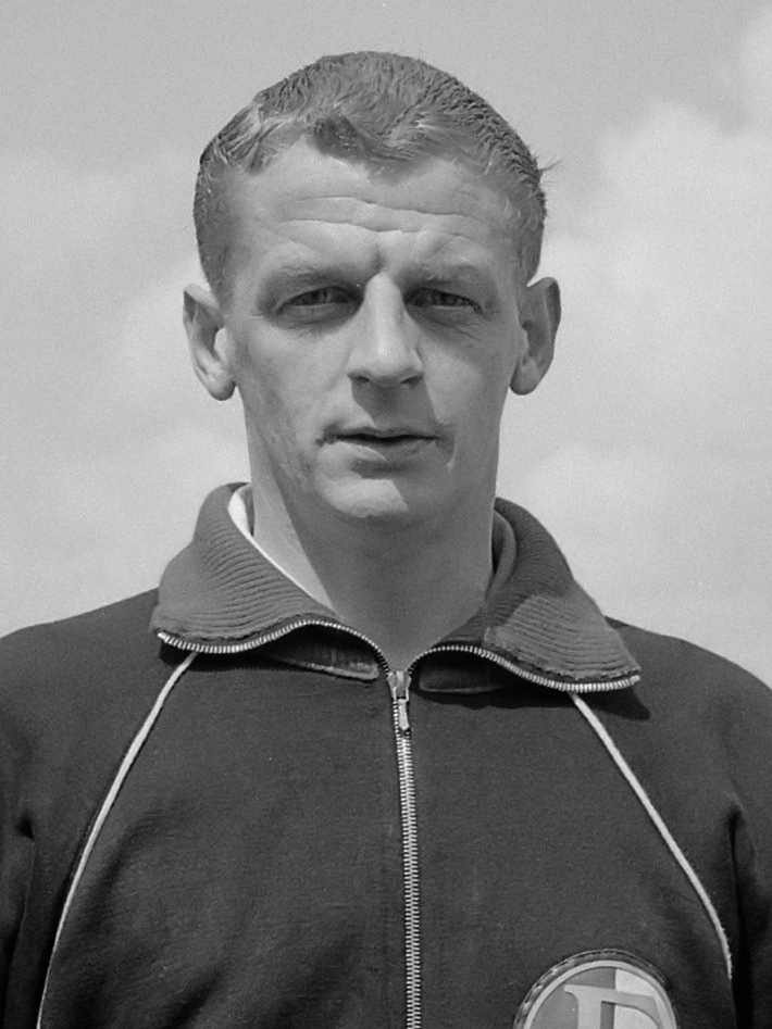 DAS tegen Feyenoord 0-2. Kop van Walhout (Feyenoord) 7 mei 1961